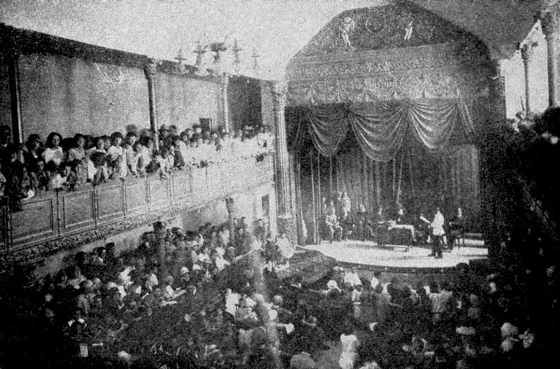 تالار تئاتر آرامیان، در محلهٔ غلهٔ ارامنه، در تبریز